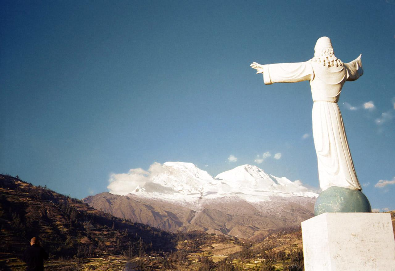 Vista del nevado Huascarán desde el pueblo de Yungay, el Cristo redentor fue construido observando al nevado como recuerdo del alúd que bajó del nevado.